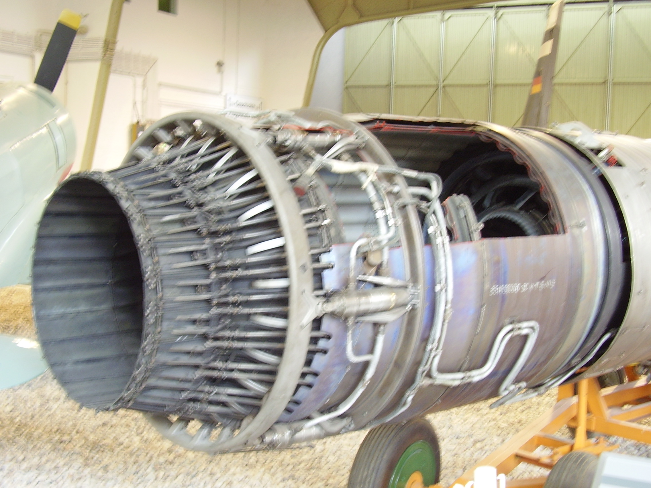 Luftwaffenmuseum der Bundeswehr; Airforce Museum of the Bundeswehr; Berlin-Gatow, Ljulka AL-21 F3